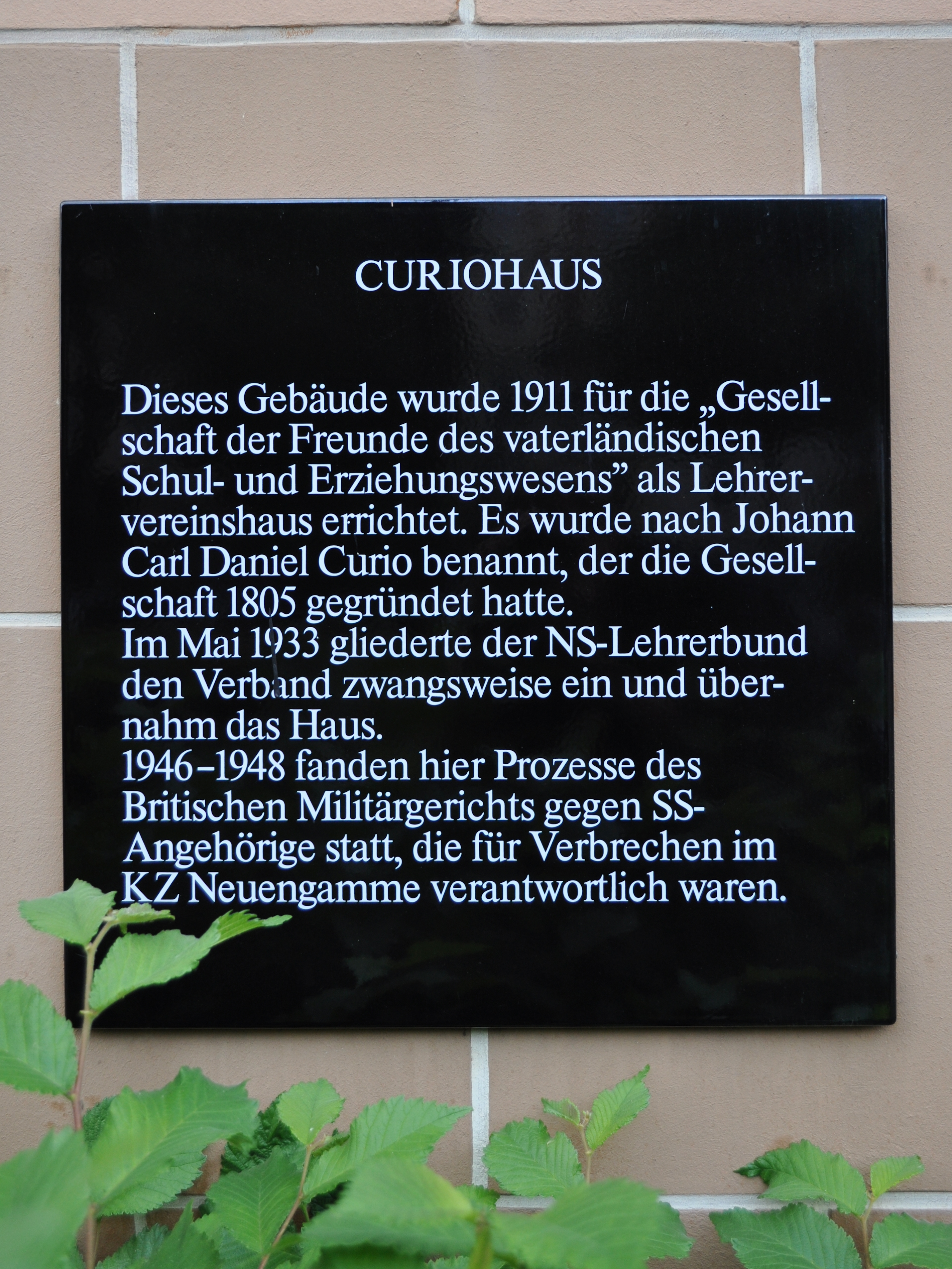 Gedenktafel links neben dem Eingang des Curio-Hauses an der Rothenbaumchaussee 11-17 in Hamburg-Rotherbaum